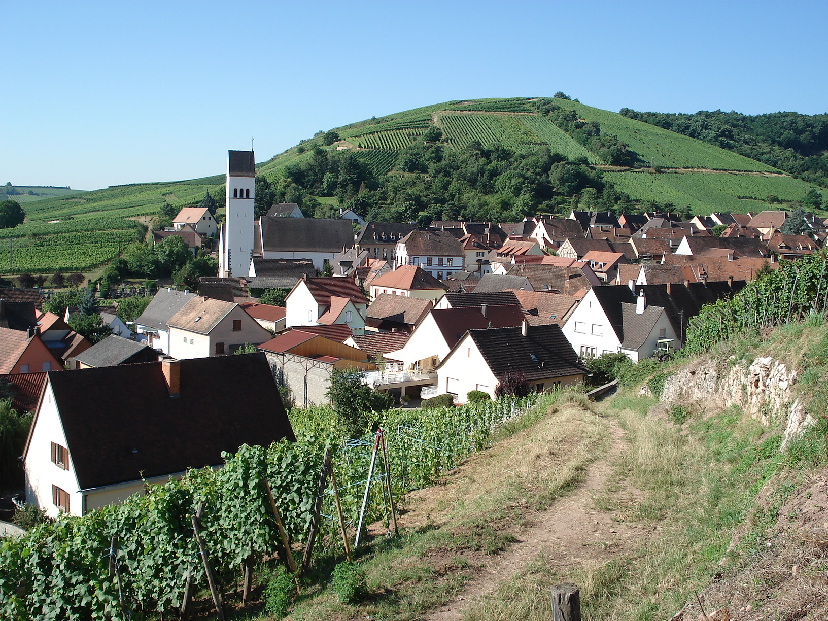 Village de Katzenthal, près de Colmar, Haut-Rhin, Alsace, France. Coup d'oeil vers le sud-ouest. Clocher de l'église Saint-Nicolas. À l'arrière-plan, colline du Neuberg.